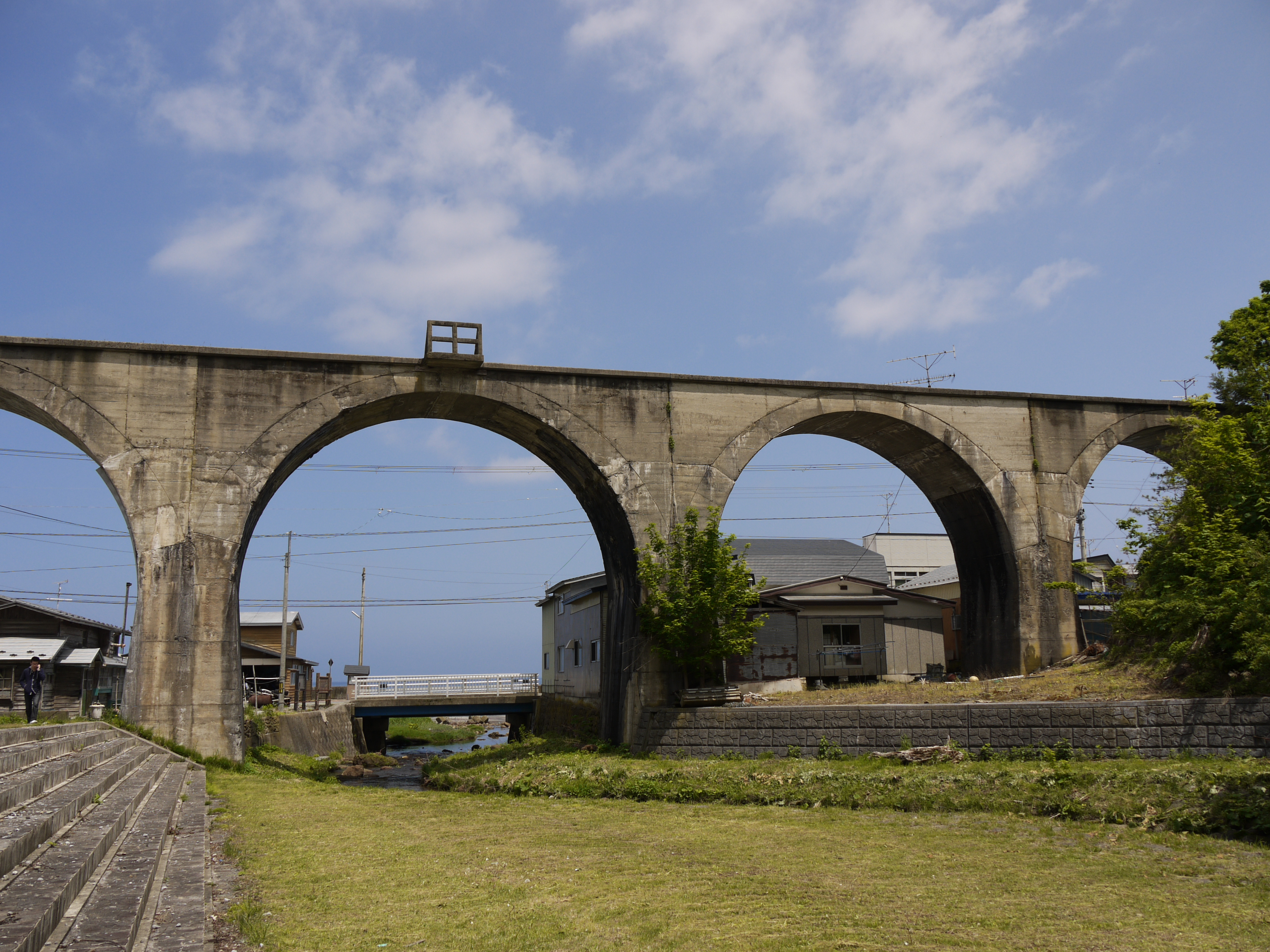 大間線(未成線) 遺構アーチ峡